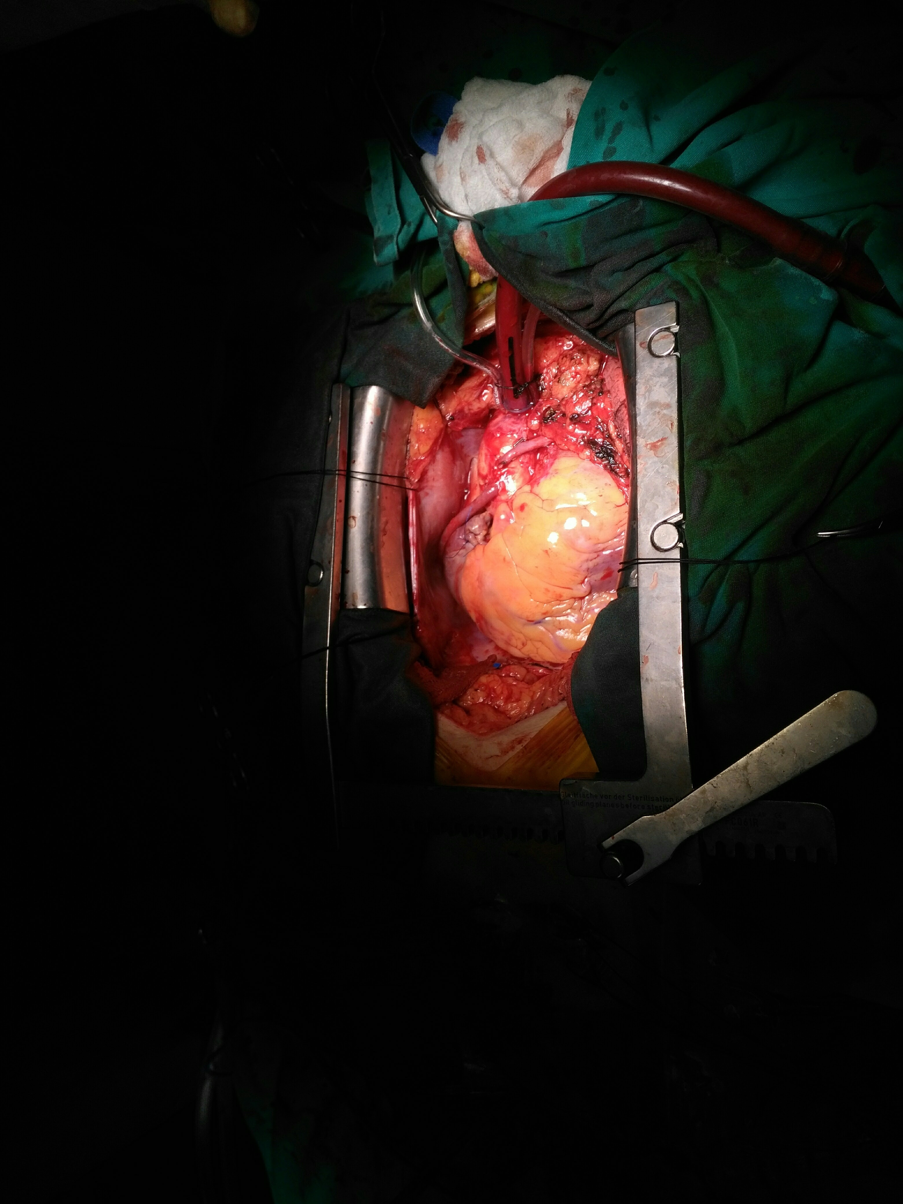 قلب خلال فترة شلل القلب)